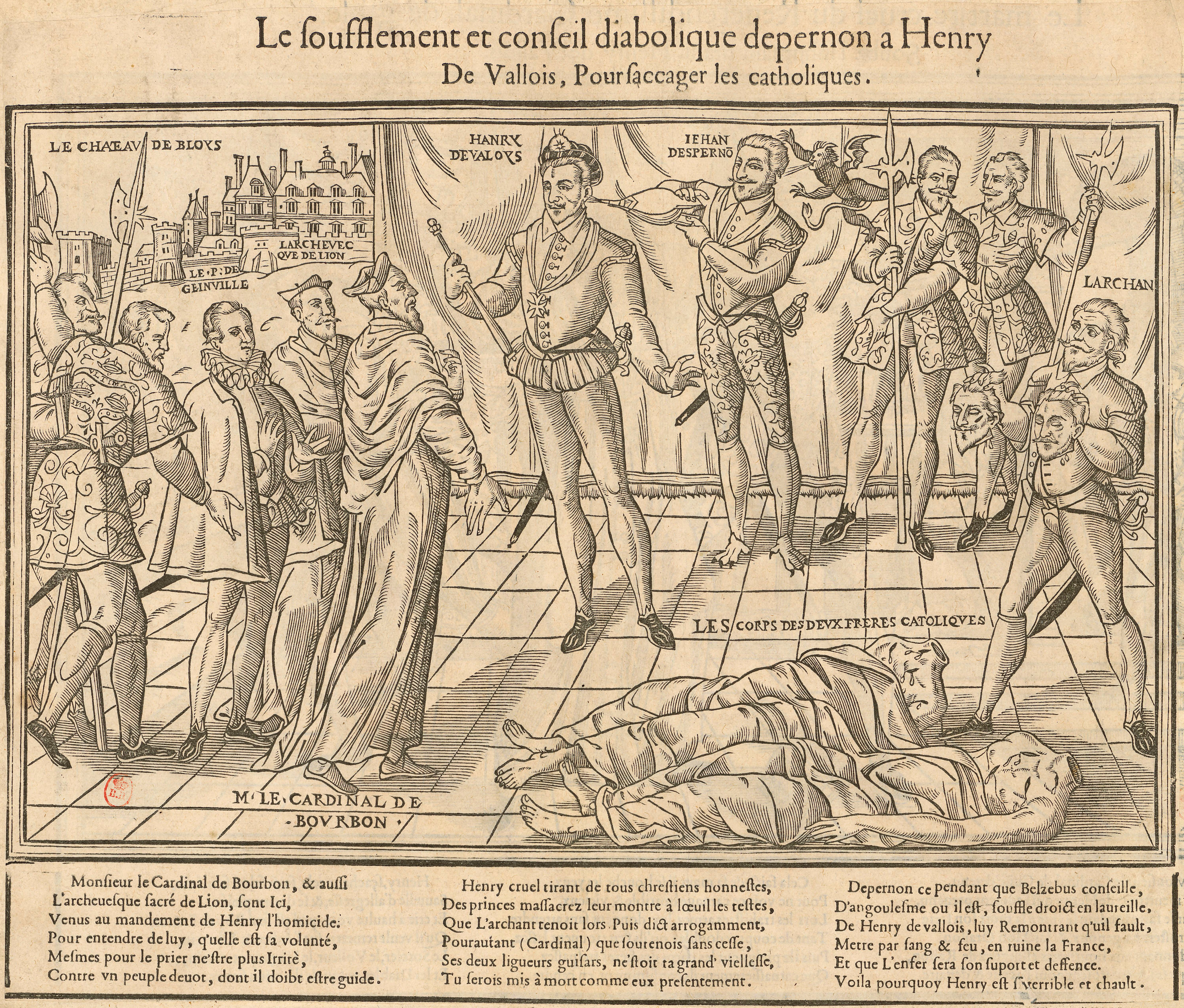 Un diablotin souffle un conseil diabolique à l'oreille du duc d'Épernon, doté lui-même de pattes démoniaques. Au moyen d'un soufflet, le mignon attise à son tour la fureur infernale du roi Henri III contre les catholiques poussés devant lui par des gardes : le cardinal Charles de Bourbon, l'archevêque de Lyon Pierre de Saint-Priest d'Épinac, et Charles, le jeune fils du duc Henri de Guise. Les corps décapités du duc Henri de Guise et du cardinal Louis de Guise gisent au pied du monarque tandis que Nicolas de Grimonville, segneur de Larchant et capitaine des gardes du roi, brandit leurs têtes coupées. À l'arrière-plan se dresse le château de Blois, théâtre de l'assassinat des deux frères Guise. Gravure sur bois figurant dans Les belles Figures et Drolleries de la Ligue... (folio 8, verso), recueil de pamphlets compilés par Pierre de L'Estoile.